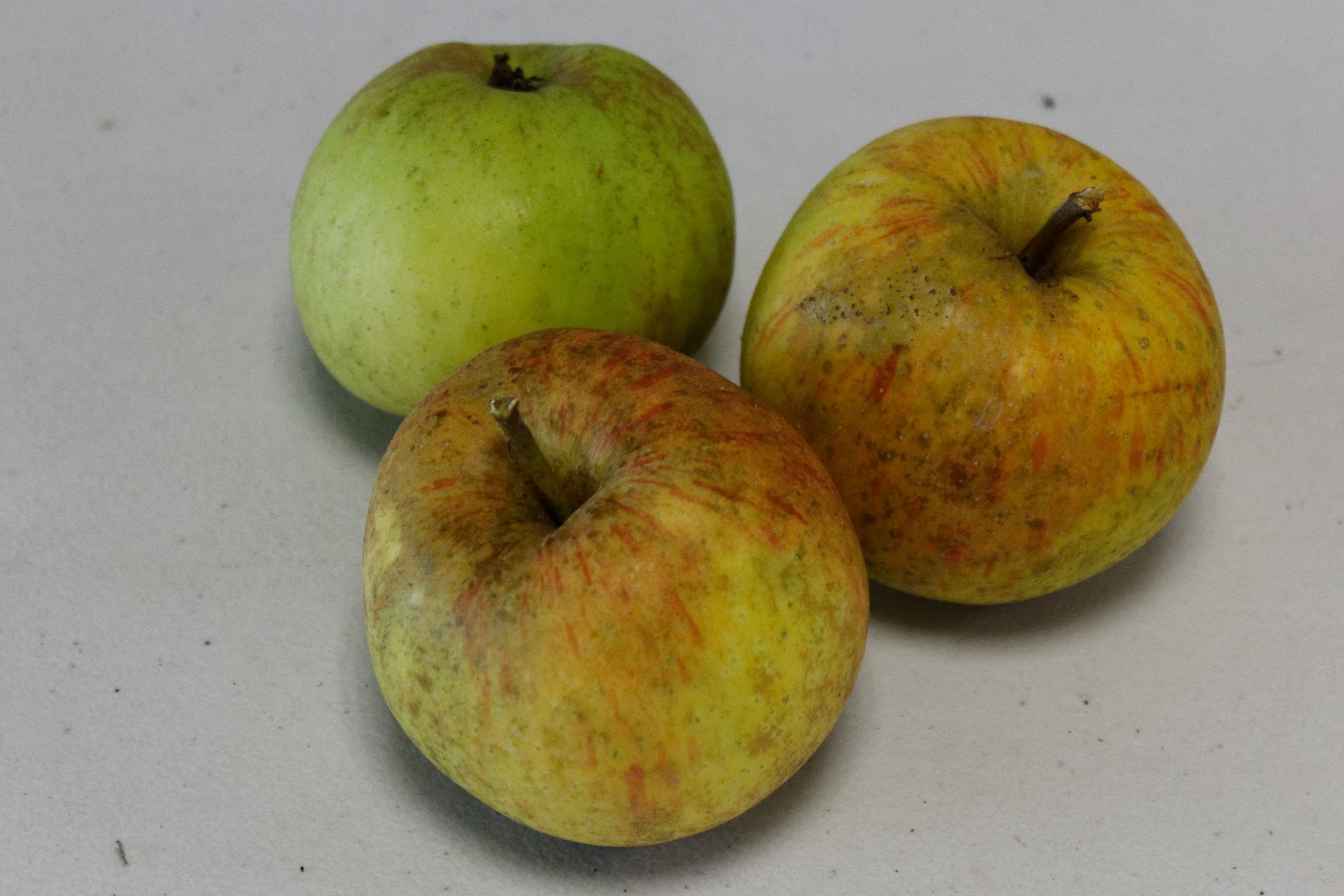 Pomme photographiée à l'OPL Peillac/Les Fougerêts.